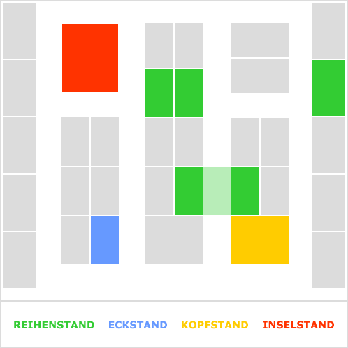 Dirk Bindmann